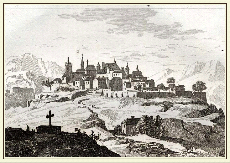 Ville de Salers, gravure romantique, 1836, Malte-Brun